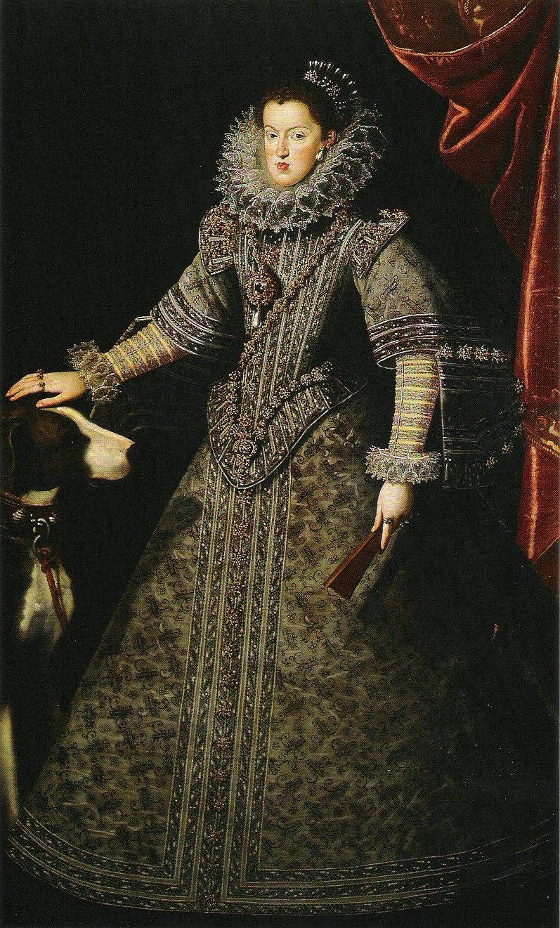 Retrato de la reina Margarita de Austria (1584-1611), que fue reina consorte de España por su matrimonio con el rey Felipe III de España, así como la madre del rey Felipe IV de España.